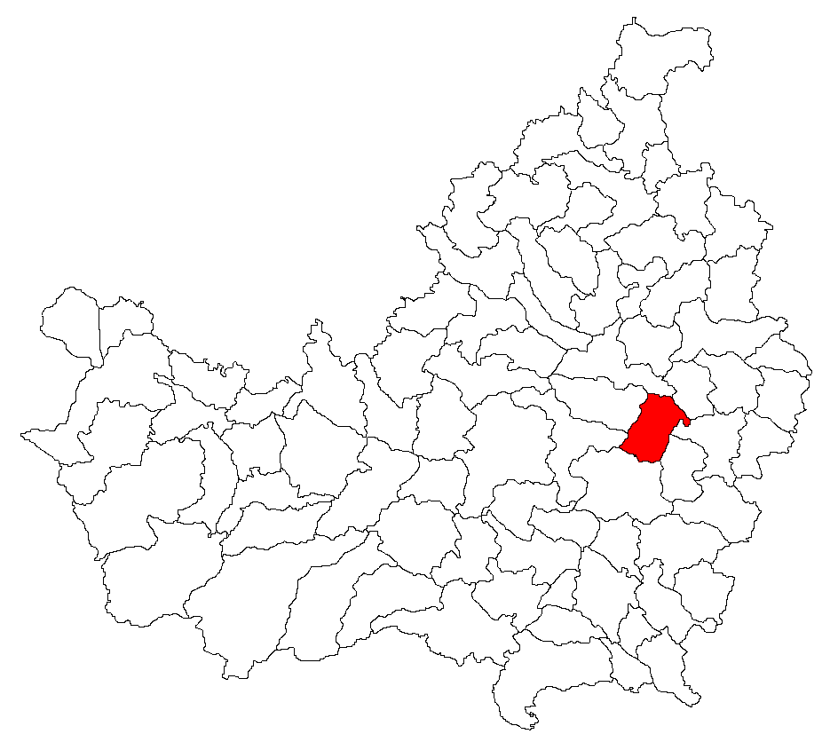 Categorie:Hărţi ale judeţului Cluj